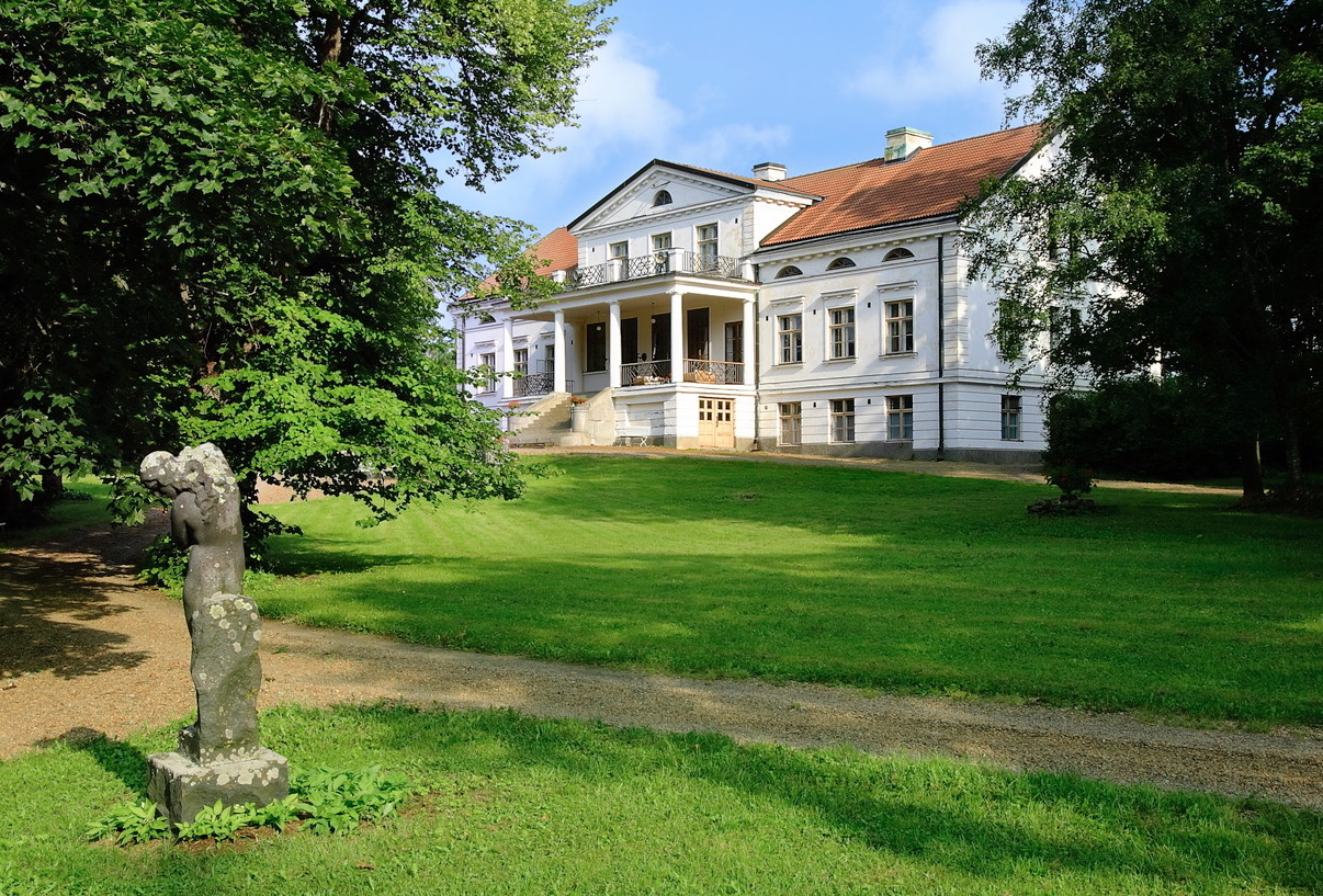 Laukon kartanon uusin päärakennus, jonka Rafael Haarla rakennutti 1931. Kuva Raija Kolehmainen.